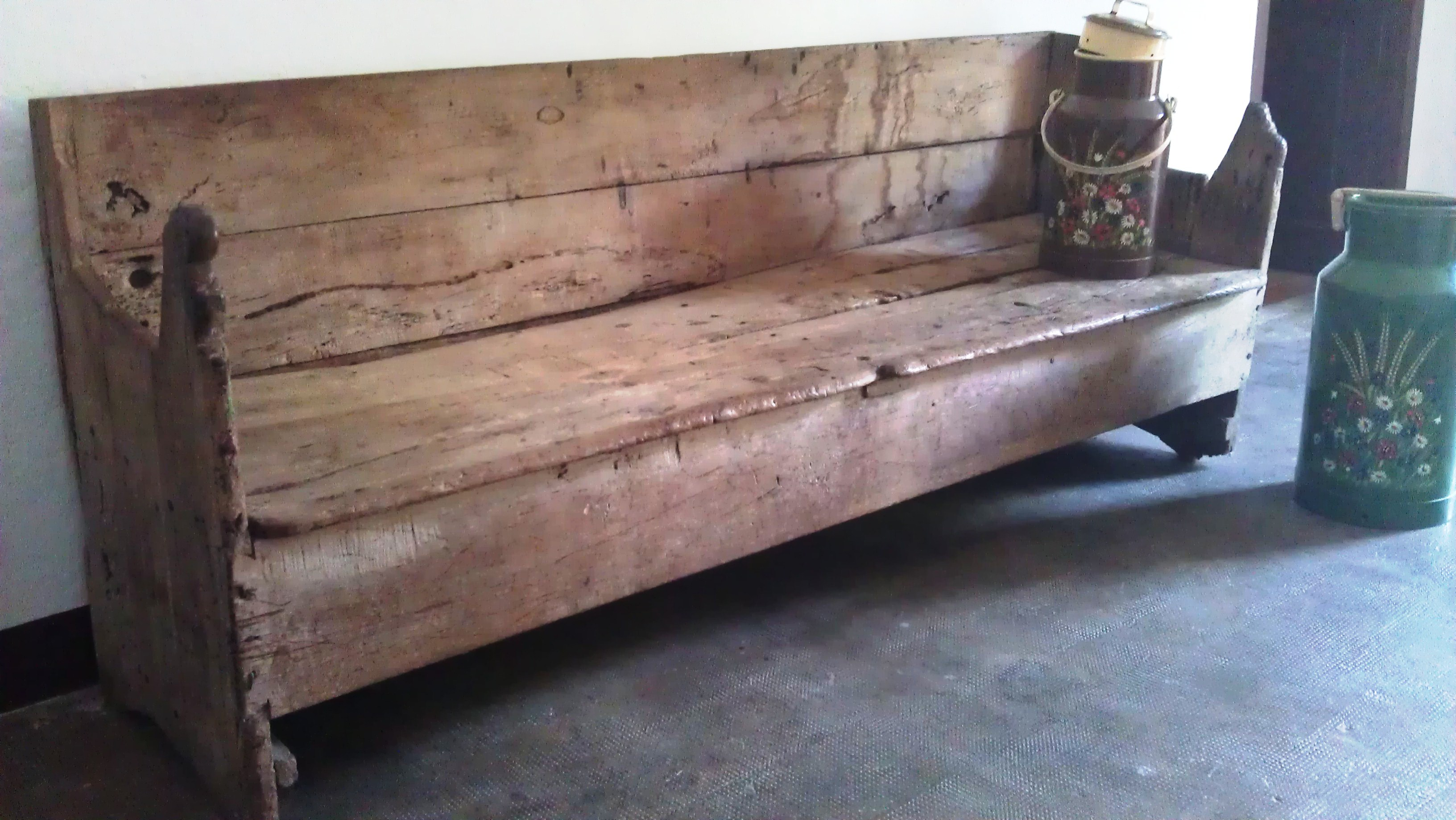 Alte Holzbank in katalanischem Bauernhaus, Vorpyrenäen